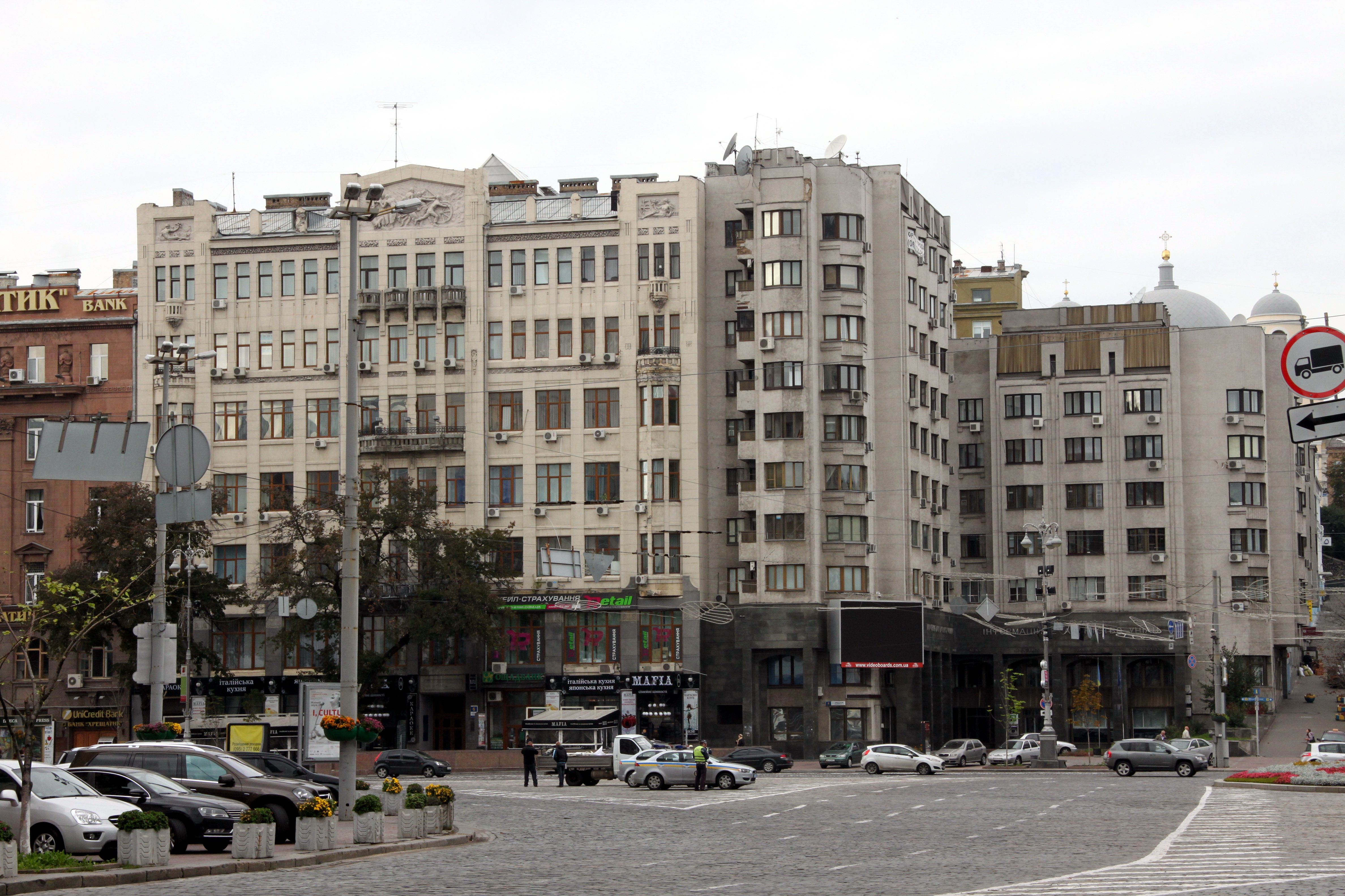 Будинок конторський і торговий (будинок трестів), Київ, Хрещатик вул., 6